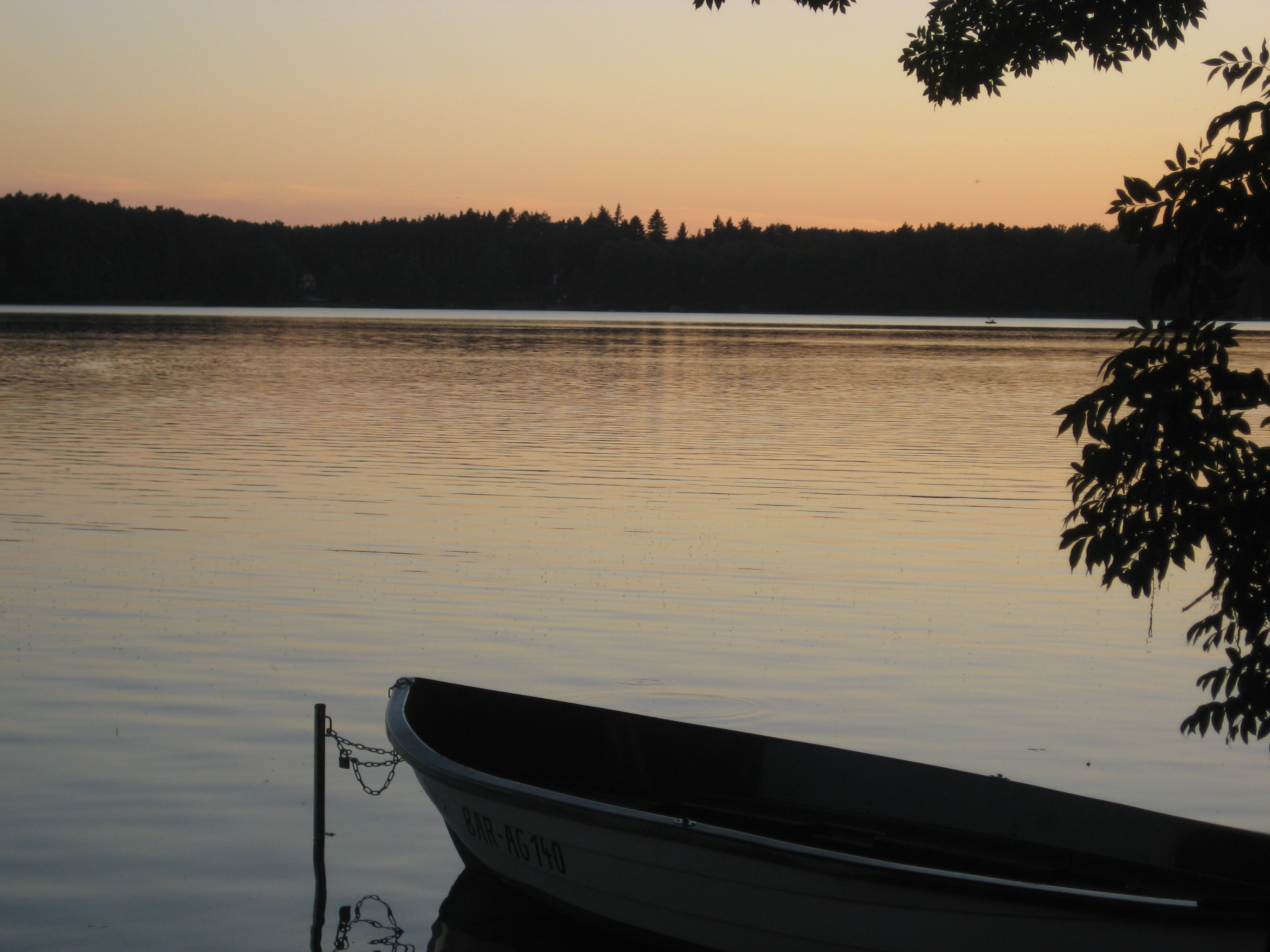 Der Wurlsee bei Lychen (Landkreis Uckermark, Brandenburg).